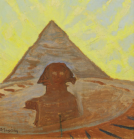 En Egypte/In Egypt